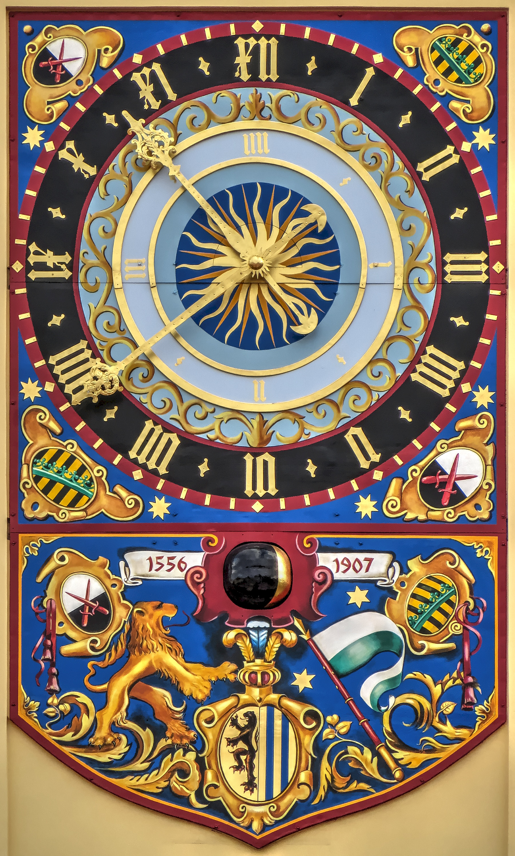 Altes Rathaus in Leipzig - Astronomische Uhr an der Westseite des Turmes (also von der Mitte des Marktplatzes aus gesehen) nach der Restaurierung 2018